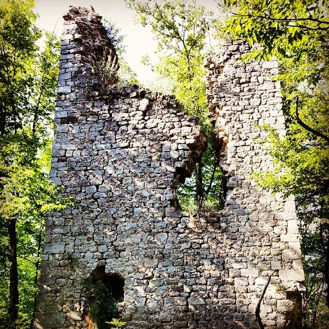 ruderi del castello di Giovagallo